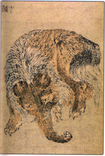 Baku (獏) by Hokusai. Contrast adjusted version of Image:HokusaiBaku.jpg, taken from File:HokusaiBaku.jpg